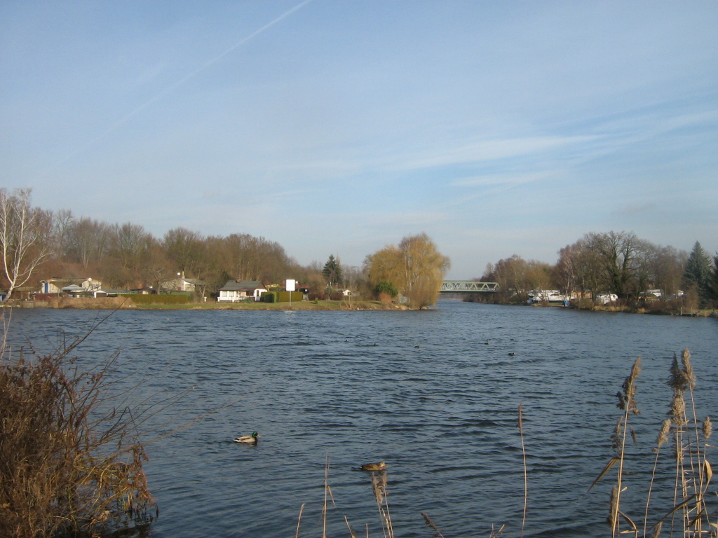 Mündung der Havel (links im Bild) in den Oder-Havel-Kanal in Oranienburg